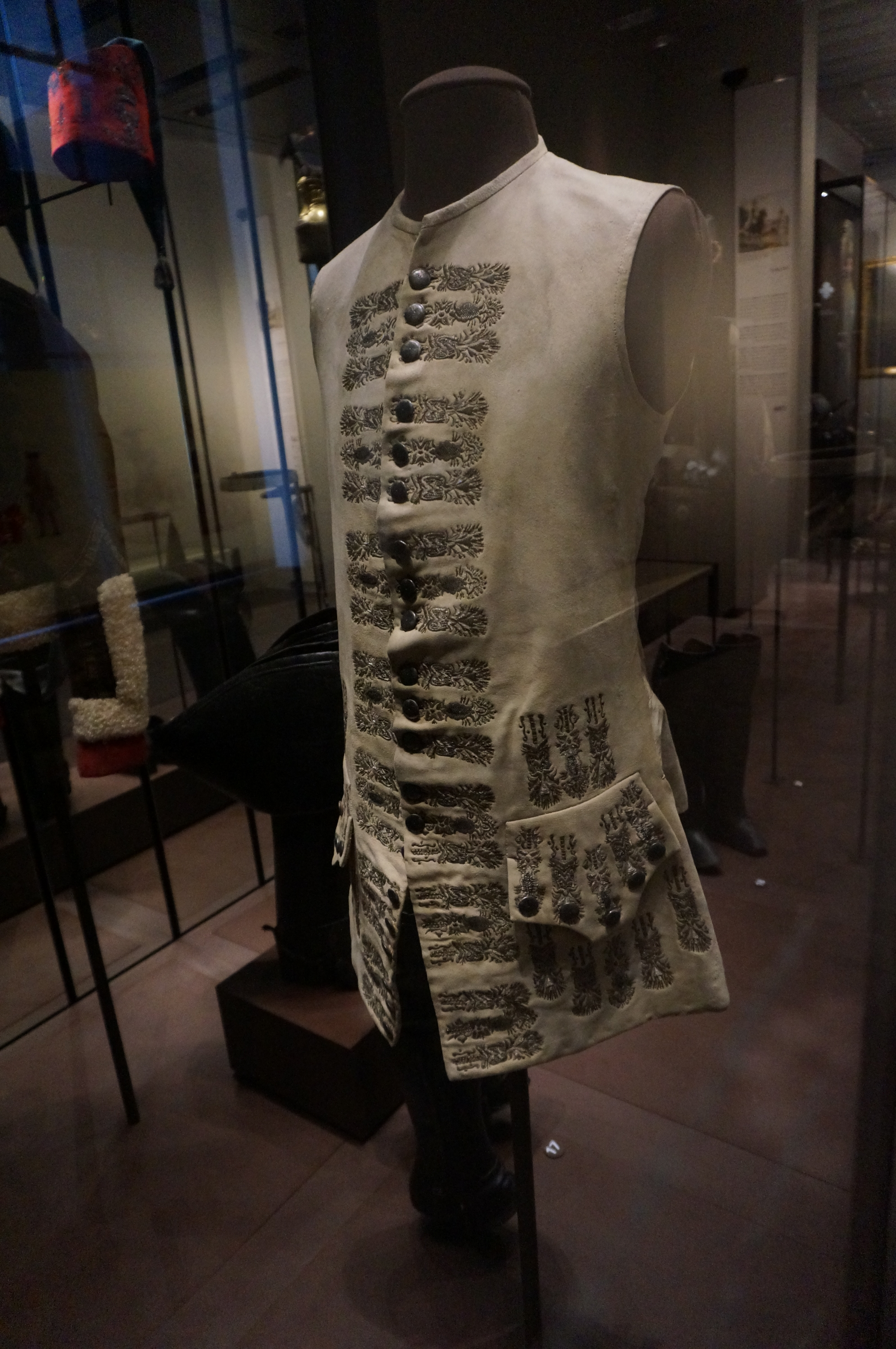 Collections of Musée de l'armée.